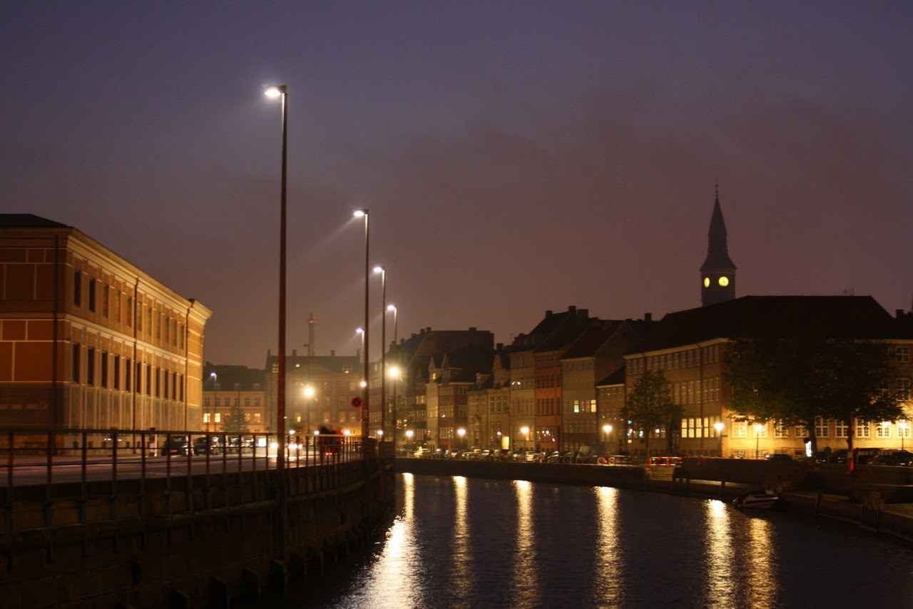 Slotsholmskanalen i København